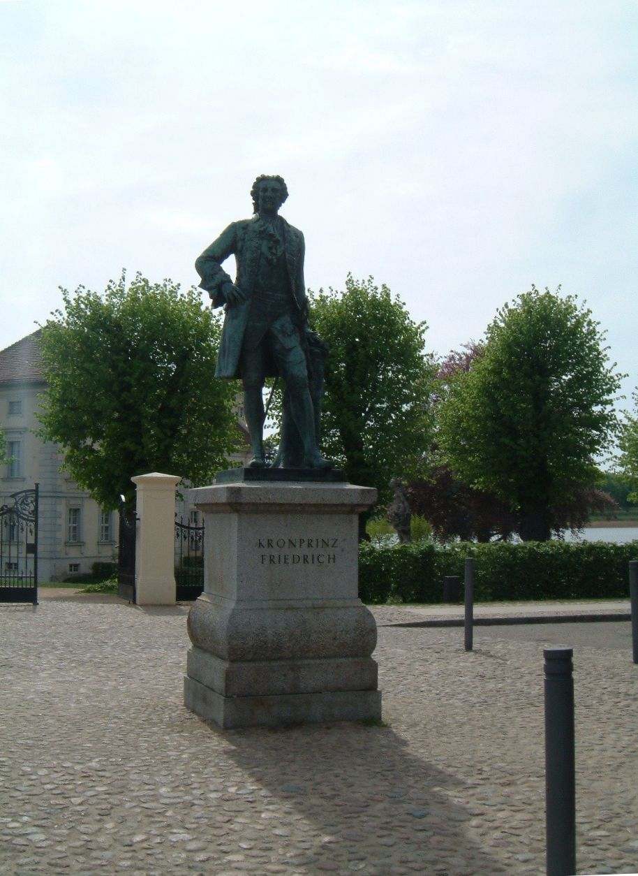 Denkmal des Kronprinzen Friedrich vor dem Schloss Rheinsberg, Deutschland.